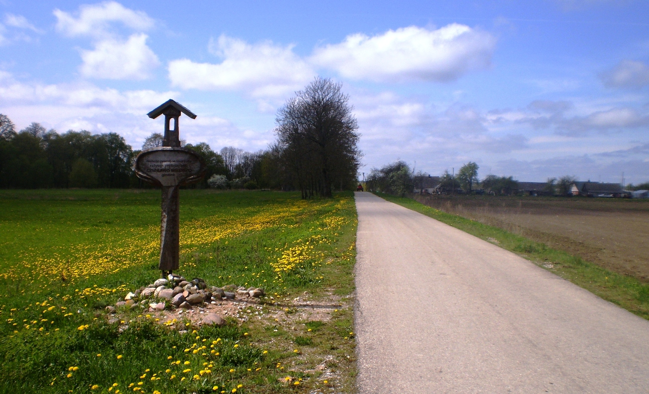 Įvažiavimas į Šatenius, Kėdainių raj.